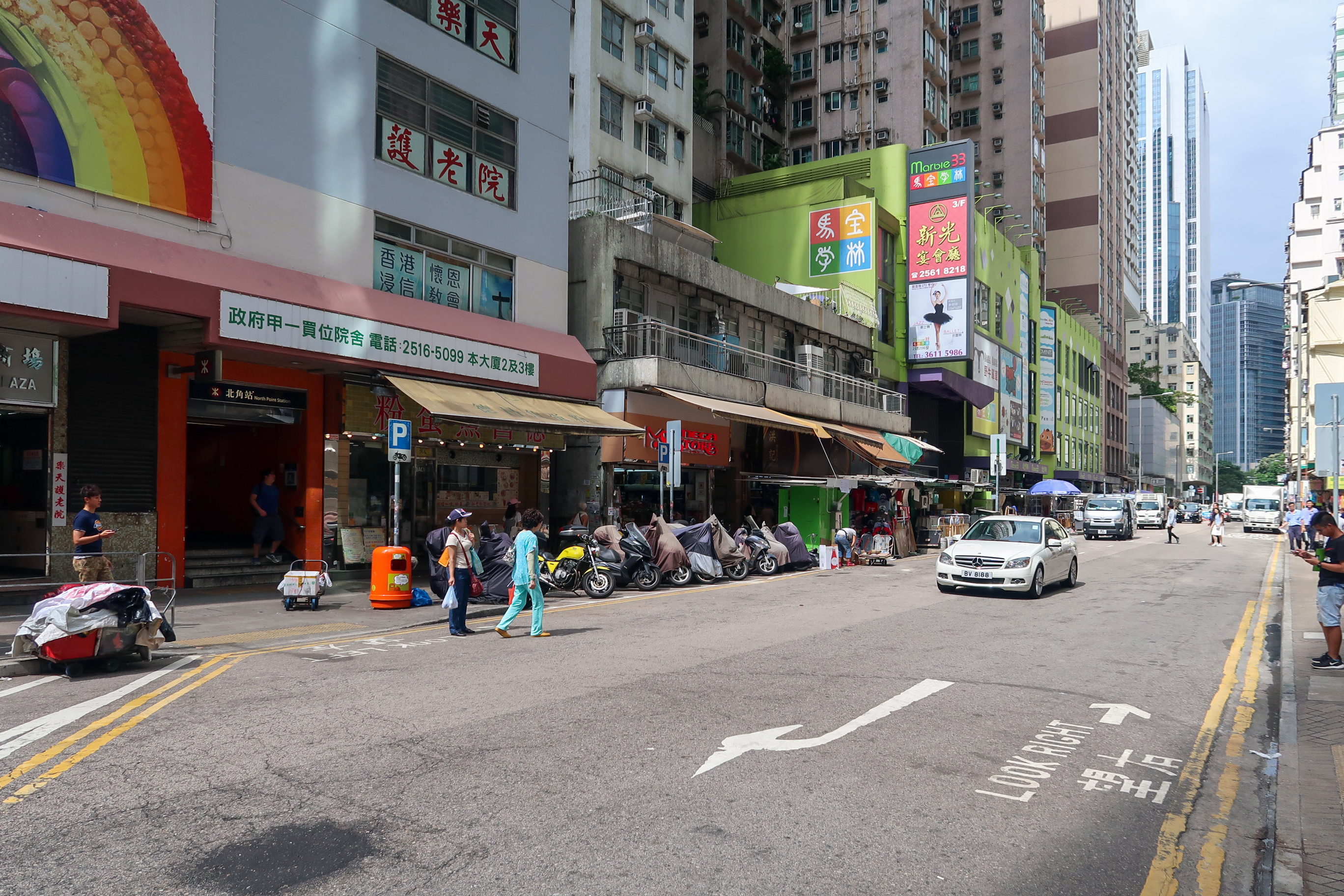 Marble Road